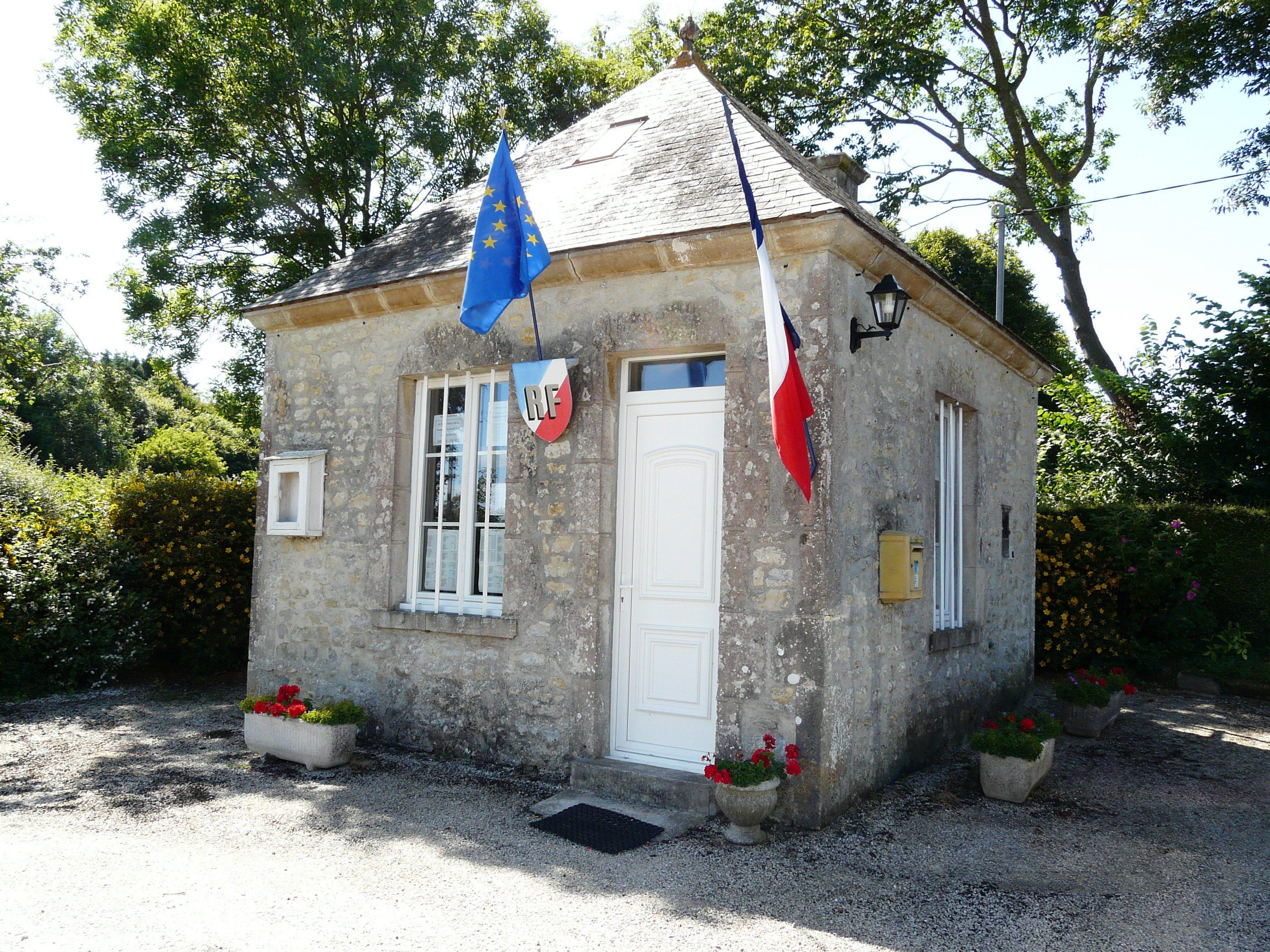 MAIRIE D'ECAUSSEVILLE 50310 FRANCE